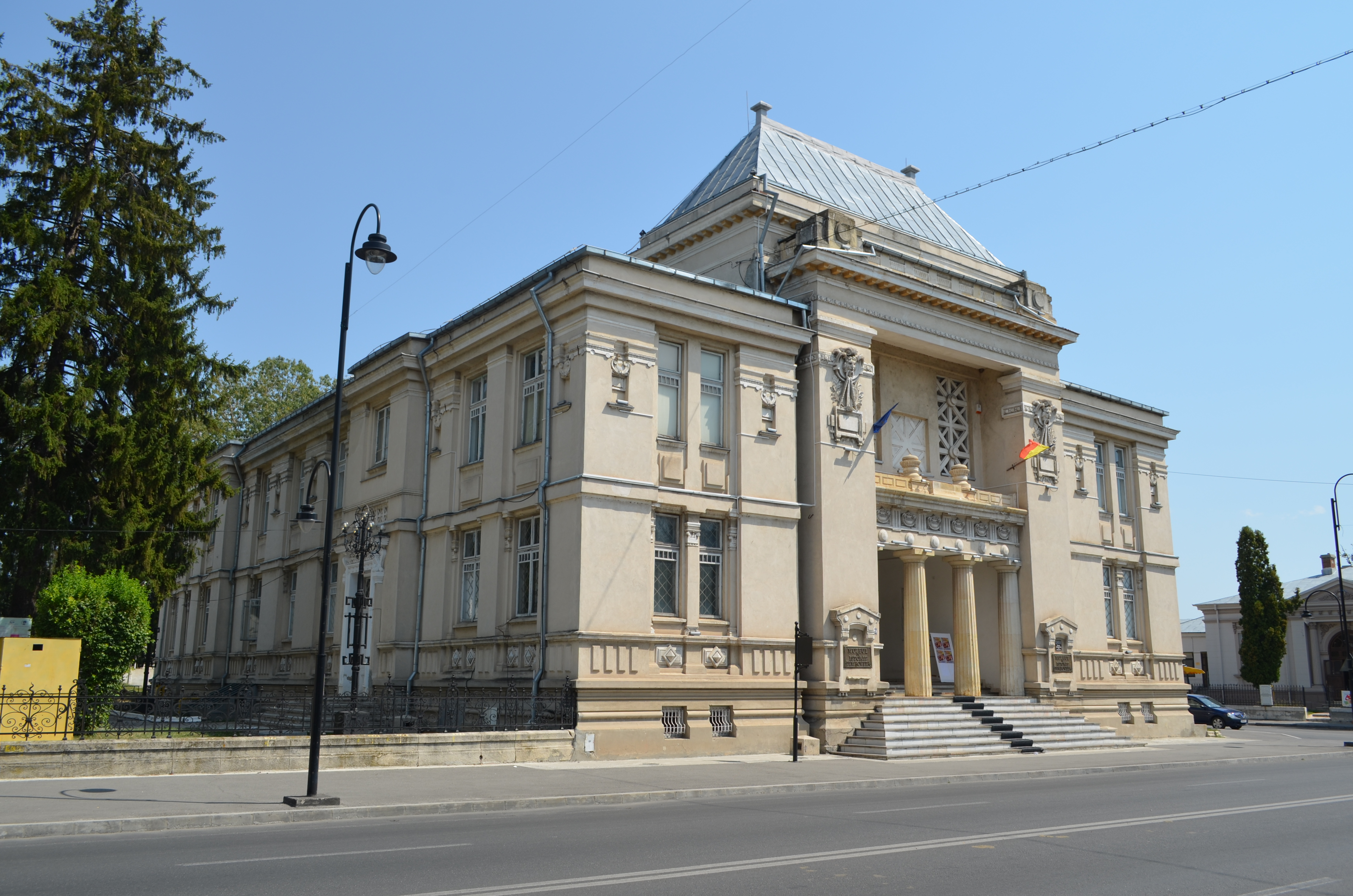 Tribunalul, azi Muzeul de istorie Dâmbovița